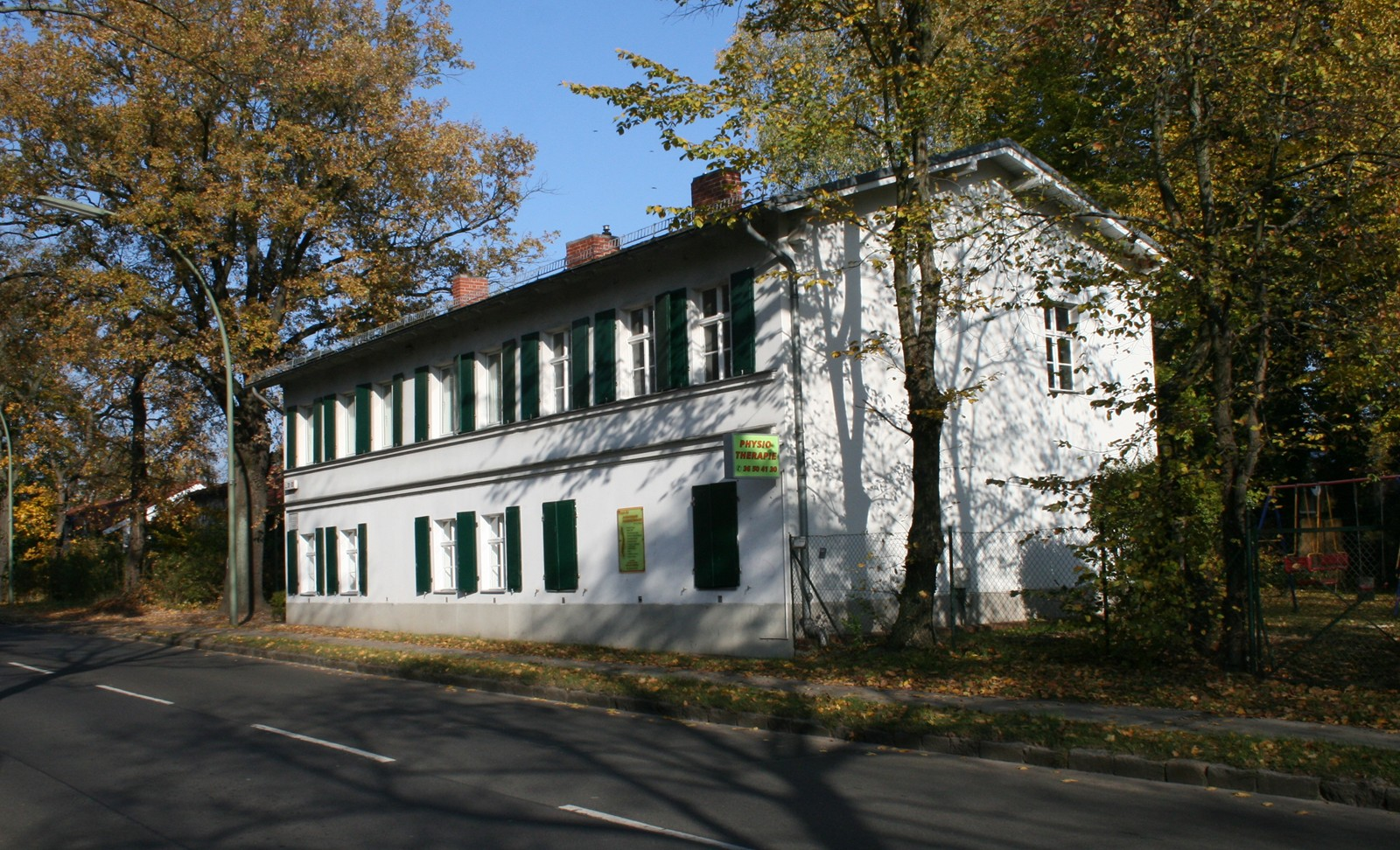 Berlin-Spandau, Gatower Straße 303. Mietshaus für die Arbeiter der Rieselfelder.